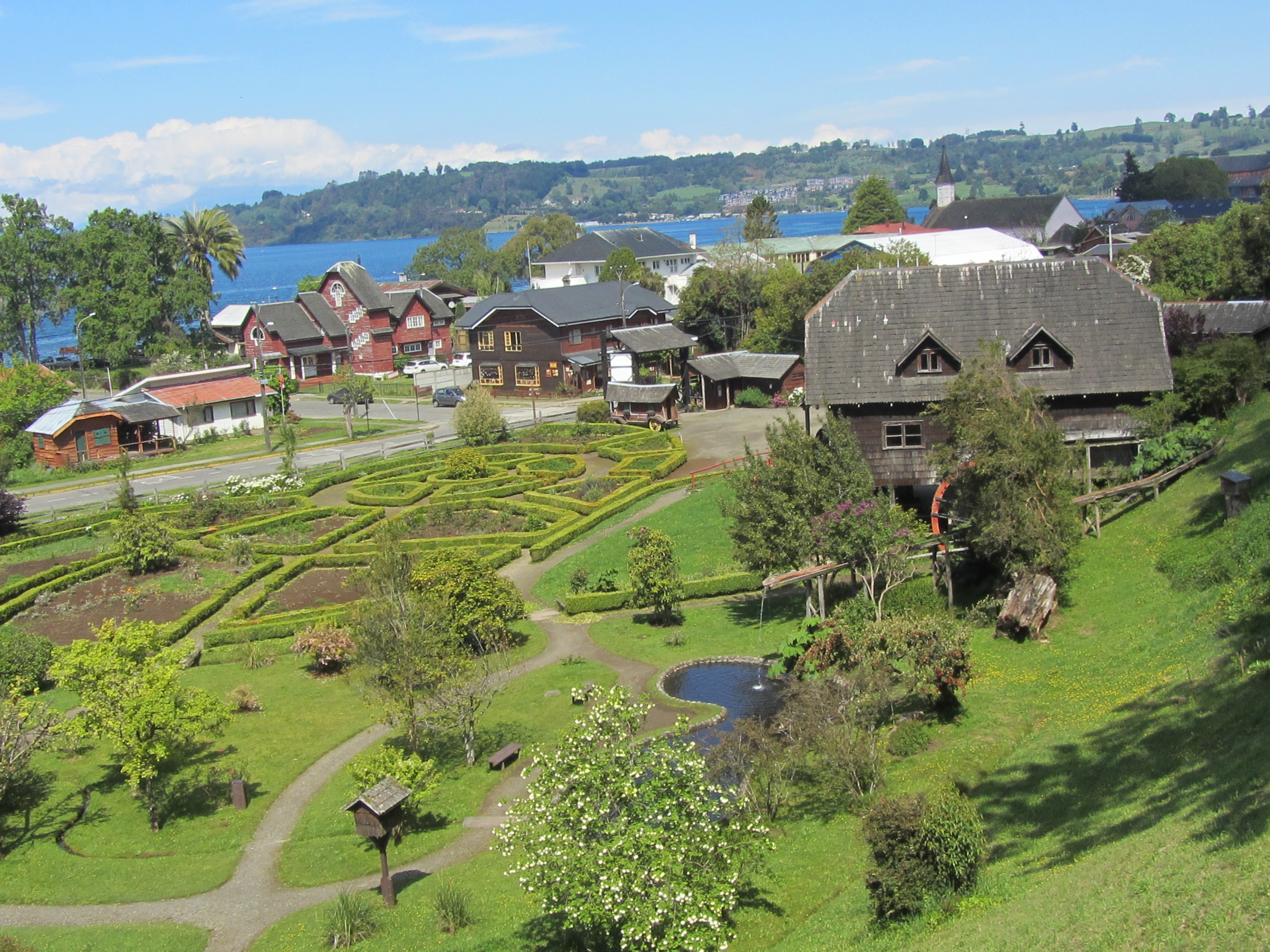 Vista al jardín del Museo Colonial Alemán y a Frutillar, Chile .